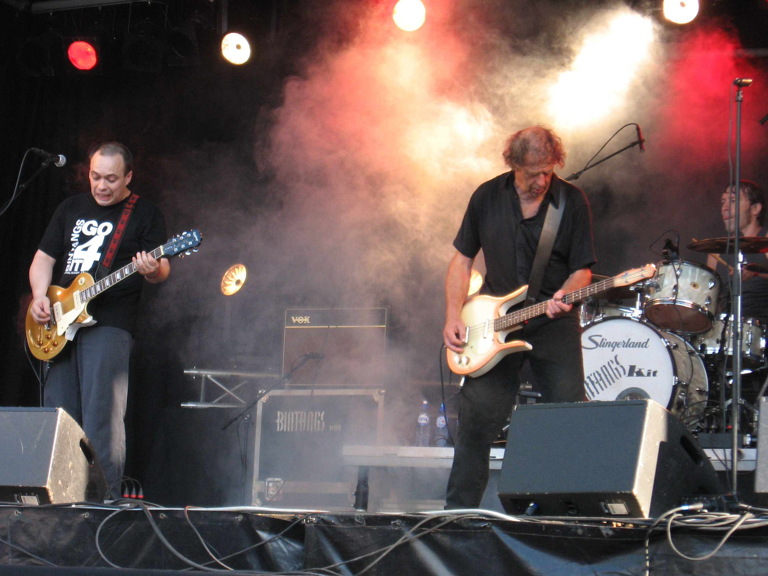 Bintangs, Westerpop